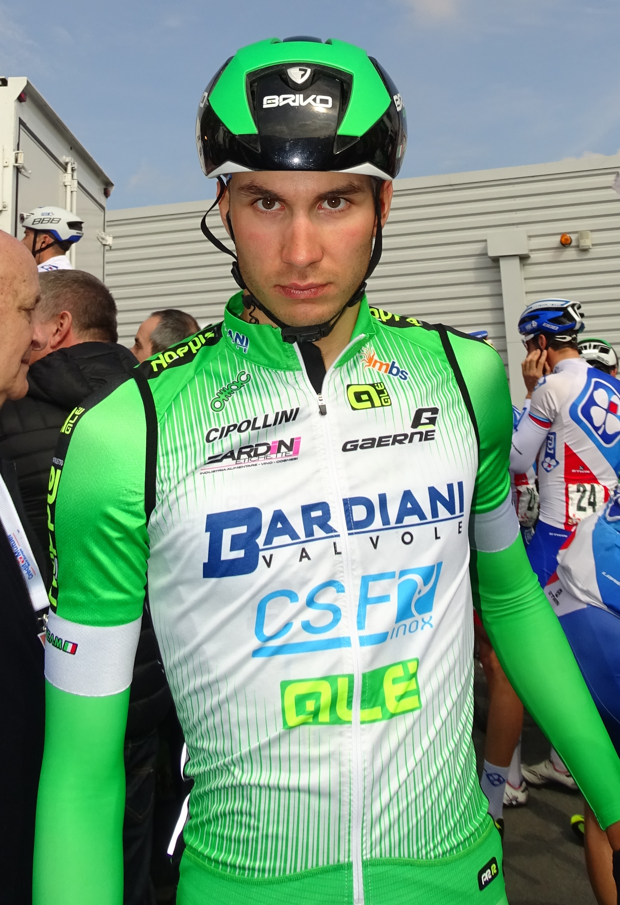 Reportage réalisé le jeudi 14 avril à l'occasion du départ et de l'arrivée du Grand Prix de Denain 2016 à Denain, Nord, Nord-Pas-de-Calais-Picardie, France.